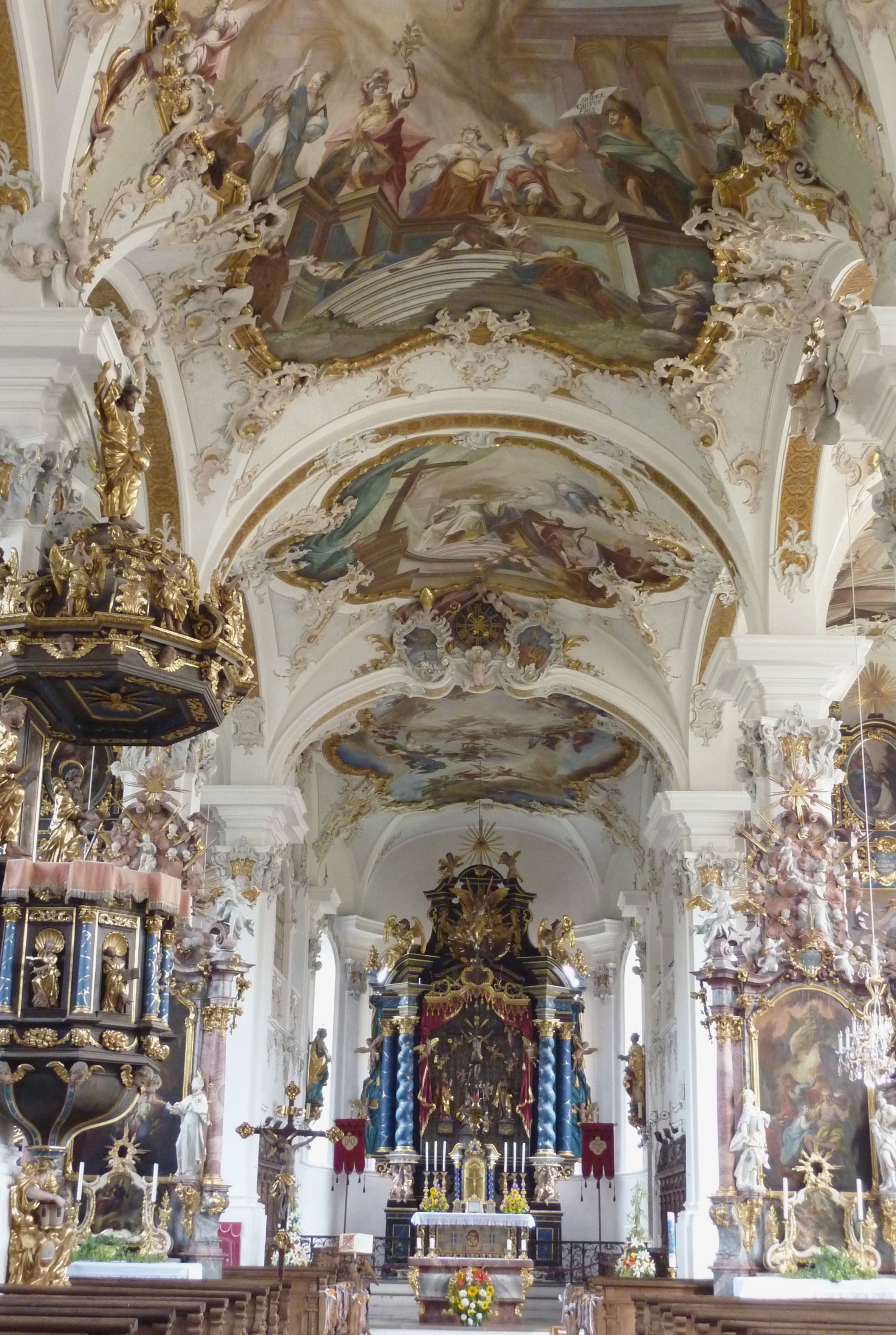 Pfarr- und Wallfahrtskirche St. Michael in Violau, einem Ortsteil von Altenmünster im Landkreis Augsburg (Bayern), Innenraum mit Blick zum Chor